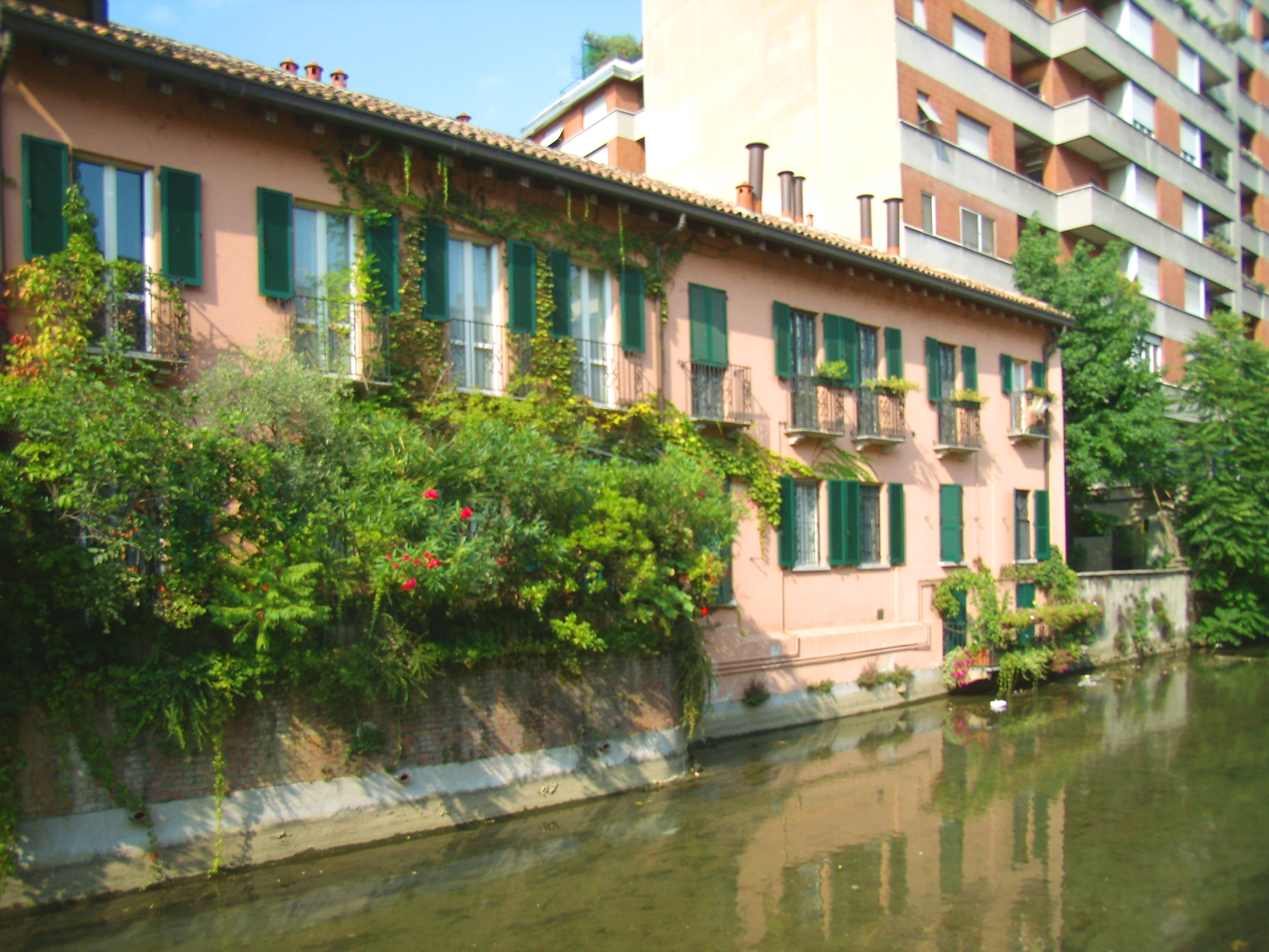 Via Tofane e Naviglio Martesana a Milano (quart. Gorla)